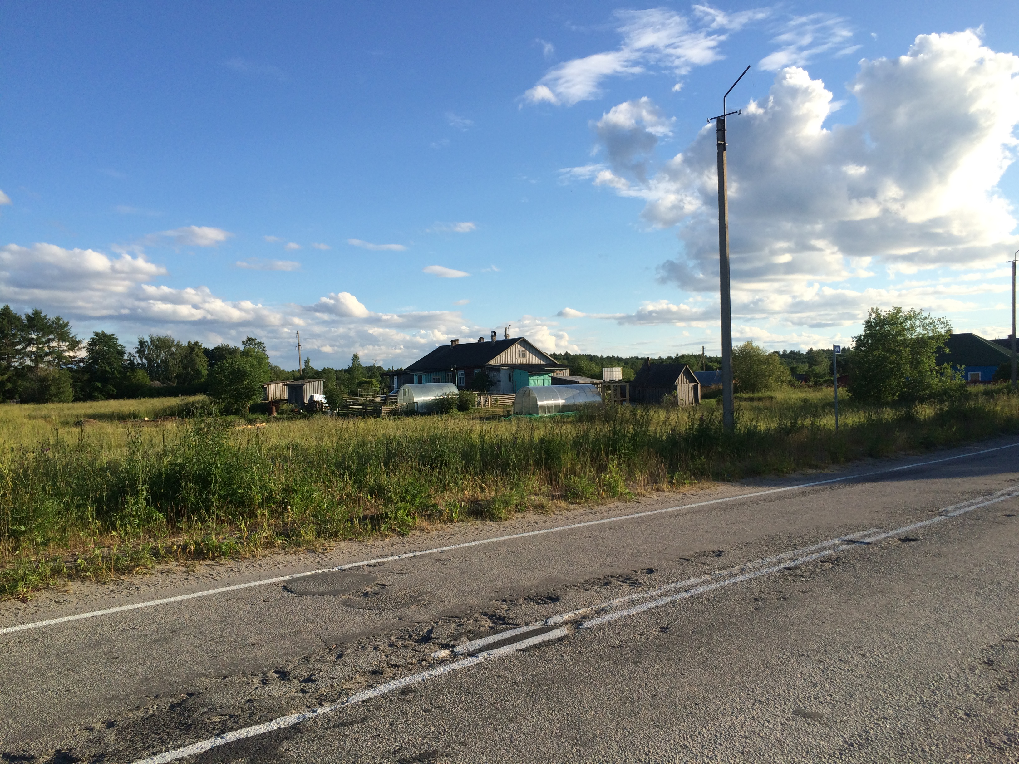 Падмозеро 2